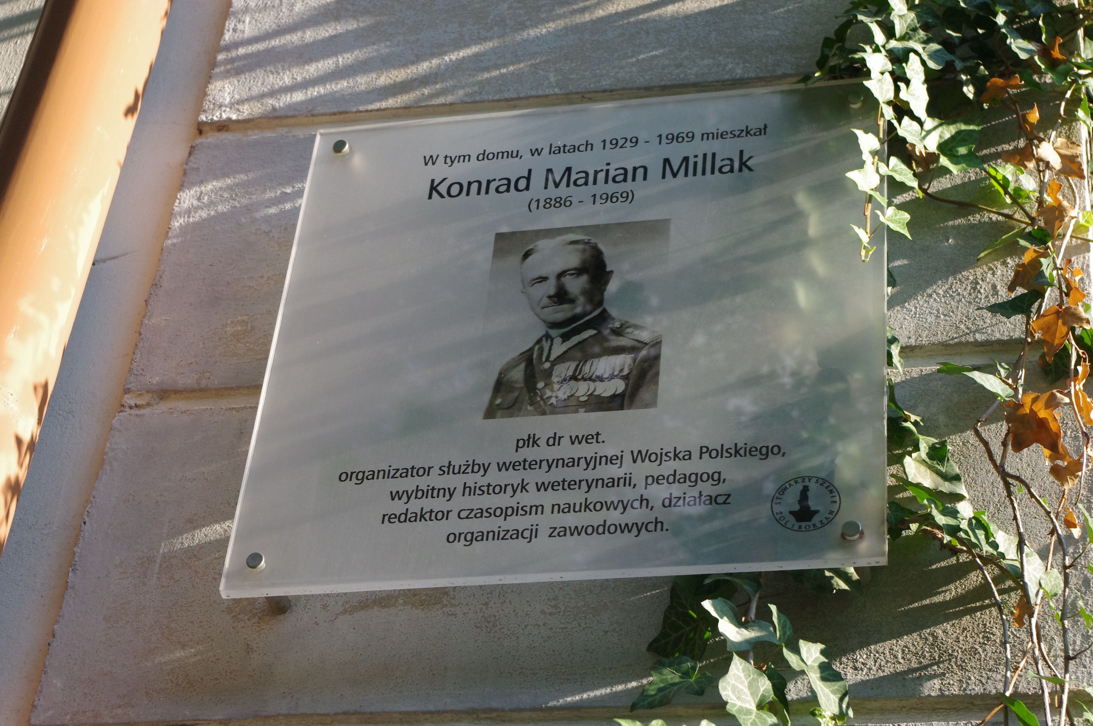 Tablica upamiętniająca pułkownika Konrada Millaka na domu w al. Wojska Polskiego 23 w Warszawie, gdzie w latach 1929-1969 mieszkał (Konrad Millak)